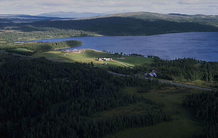 Skalstuguvägen Motiv: Saxvallen Nyckelord: Flygbilder, Riksintressen Kategori: SkogslandskapSkalstuguvägen.